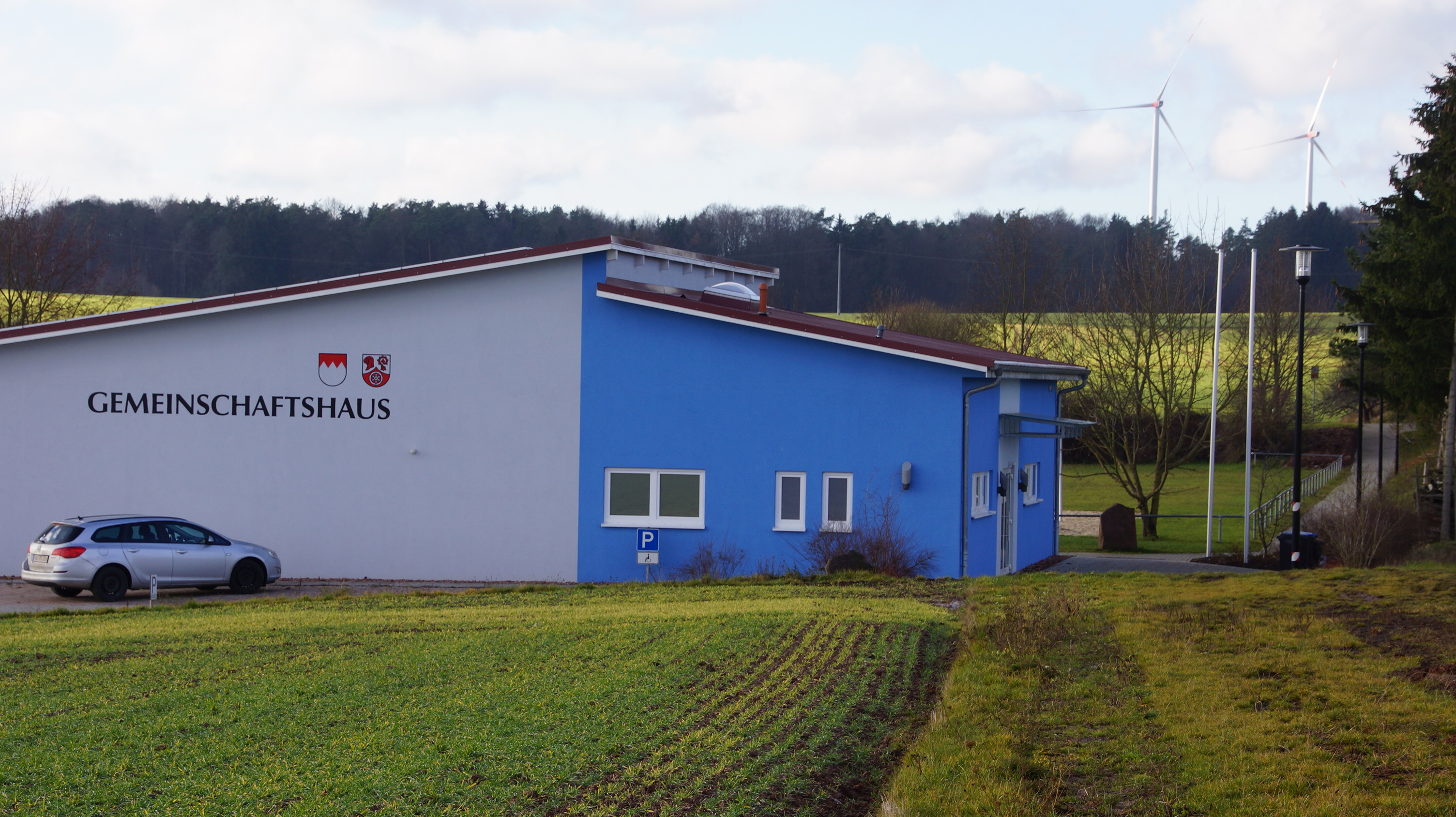 Windpark in Neunkirchen (Unterfranken) bei Miltenberg